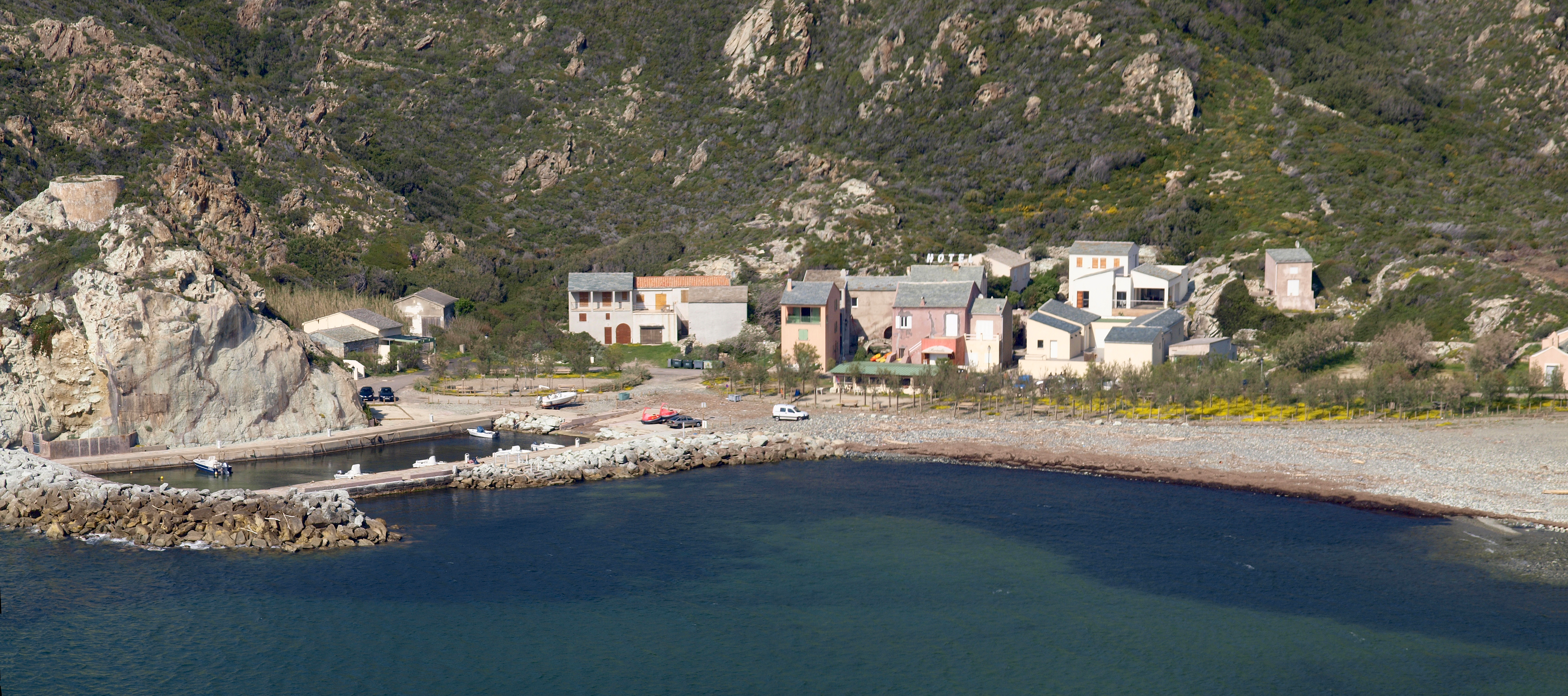 Barrettali (Corsica) - Marine de Giottani